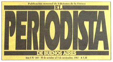 Logo de El Periodista de Buenos Aires. Gracias a Verónica, y a sus hijos Ezequiel y Débora.